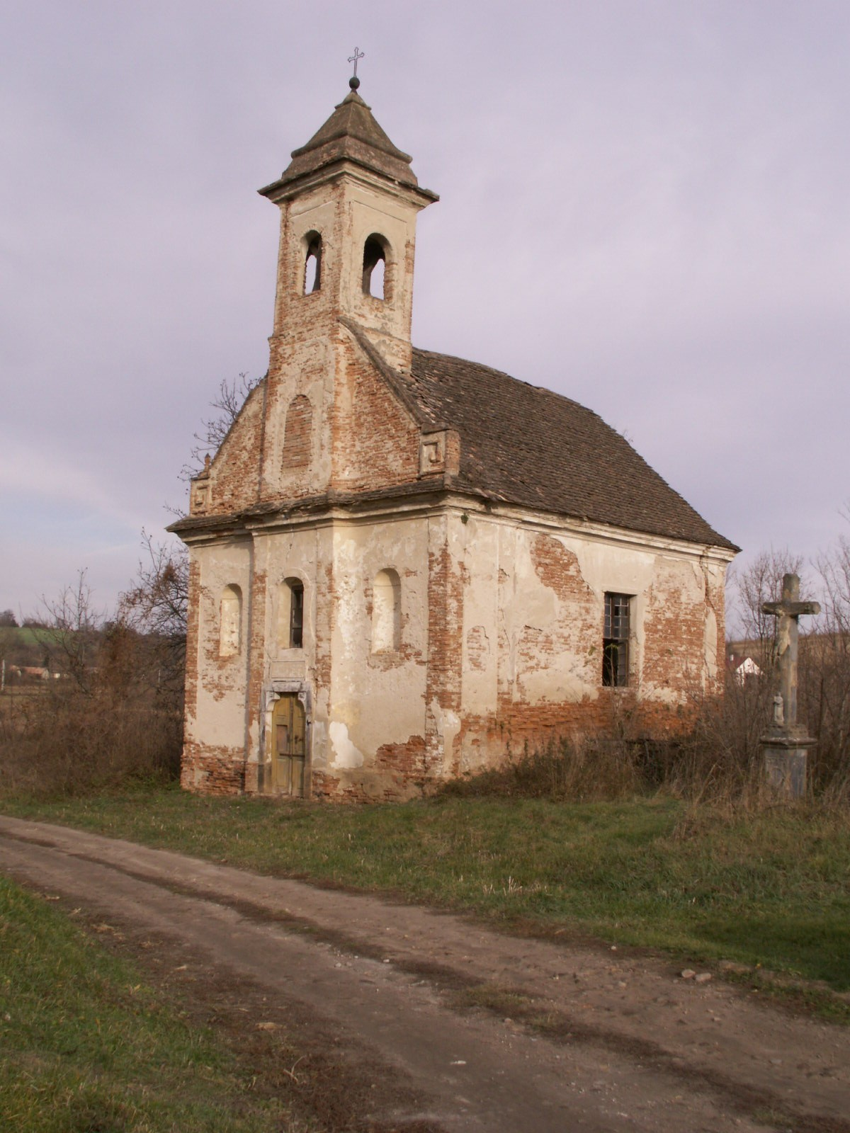 Ez a kép a Tevel község hez tartozó Kovácsi (Tevel) templomát mutatja.